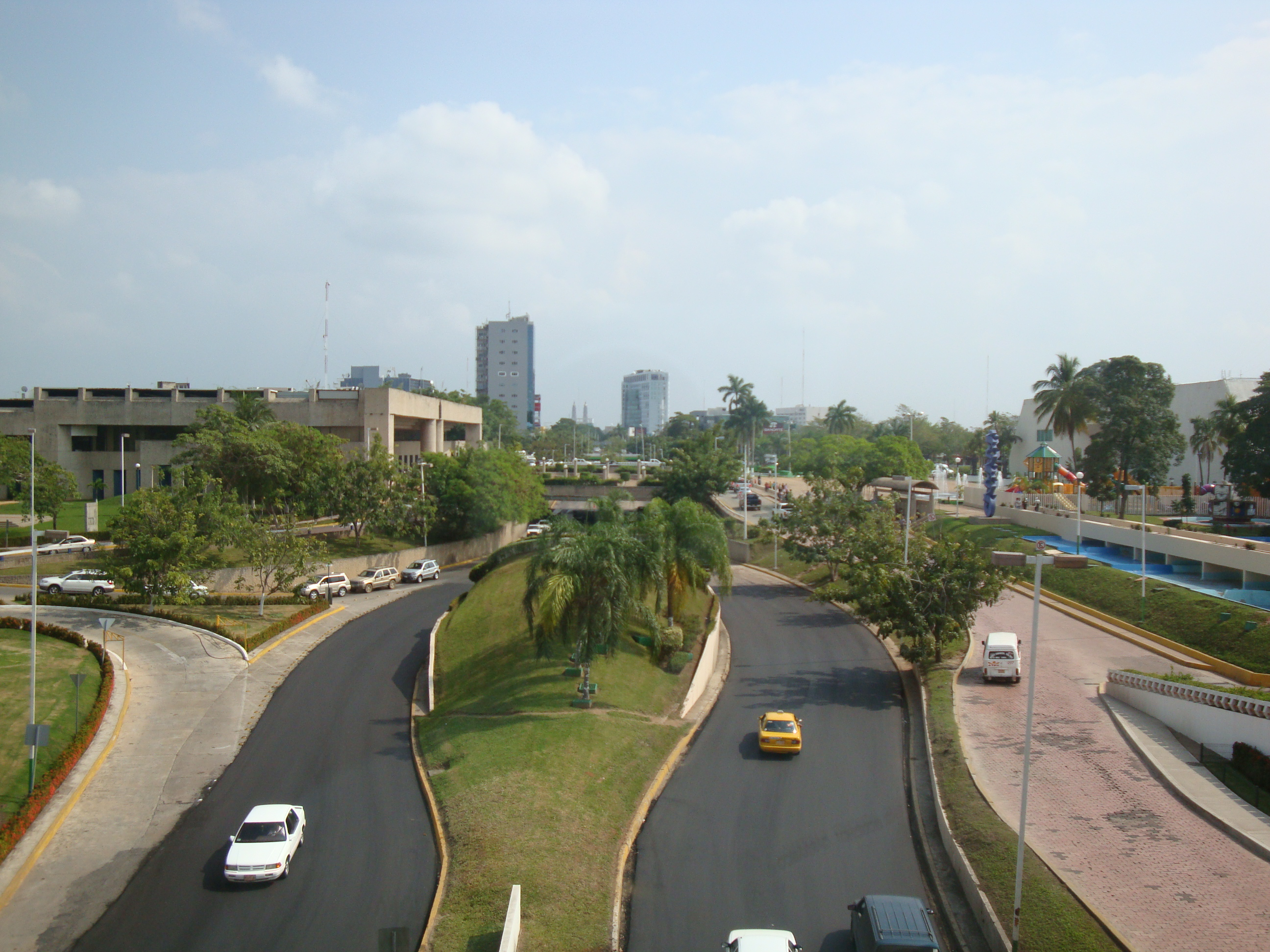 Panorámica del desarrollo urbanístico Tabasco 2000 en la ciudad de Villahermosa, estado de Tabasco, México.